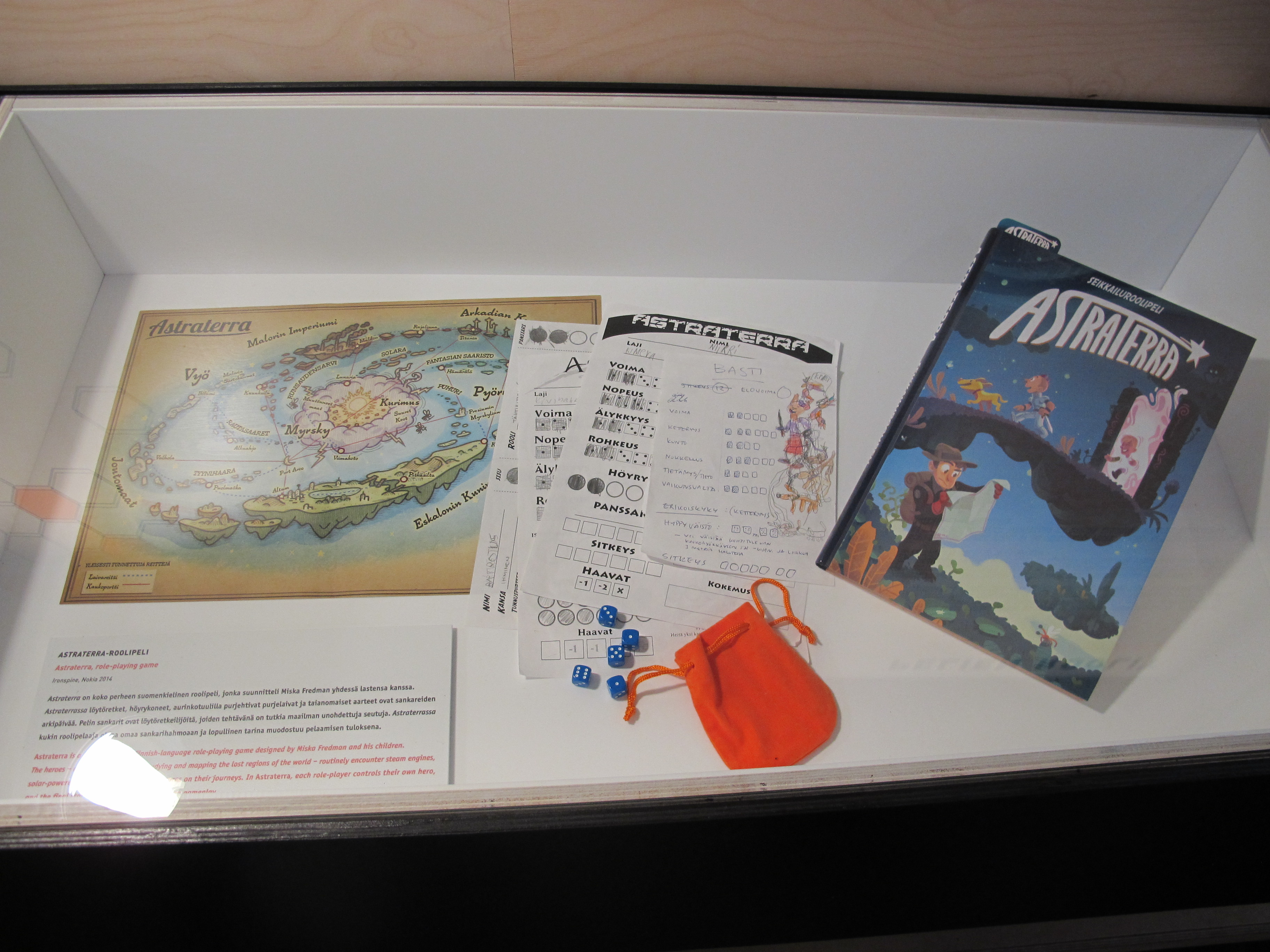 Astraterra-roolipeli ja sen kehitysmateriaalit esillä mediamuseo Rupriikissa syksyllä 2016.